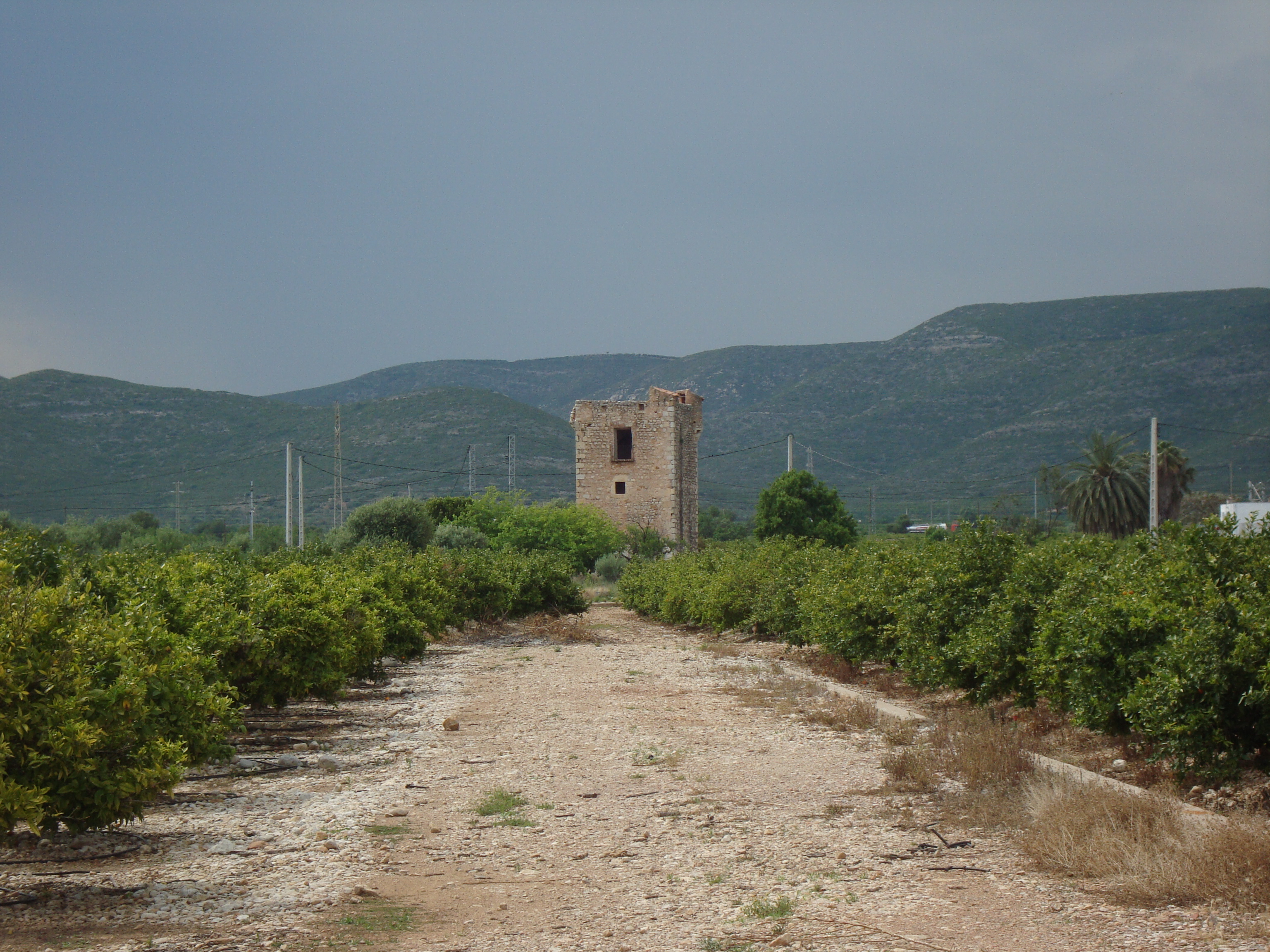 Torre del Carme (Cabanes)